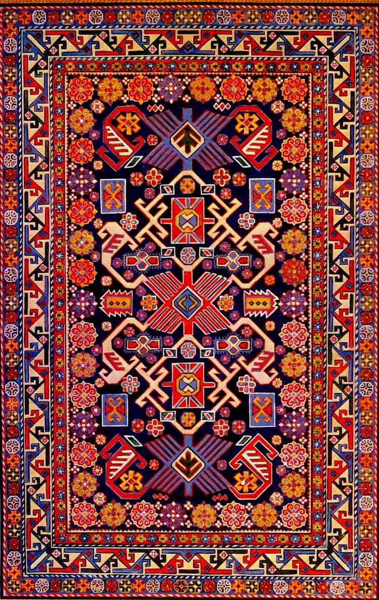 Şirvan xalçaçılıq məktəbinin ən məşhur kompozisiyalarından olan "Bico xalçaları" hazırda Ağsu rayonunun inzibati ərazi vahidinə daxil olan Bico kəndinin adını daşıyır.